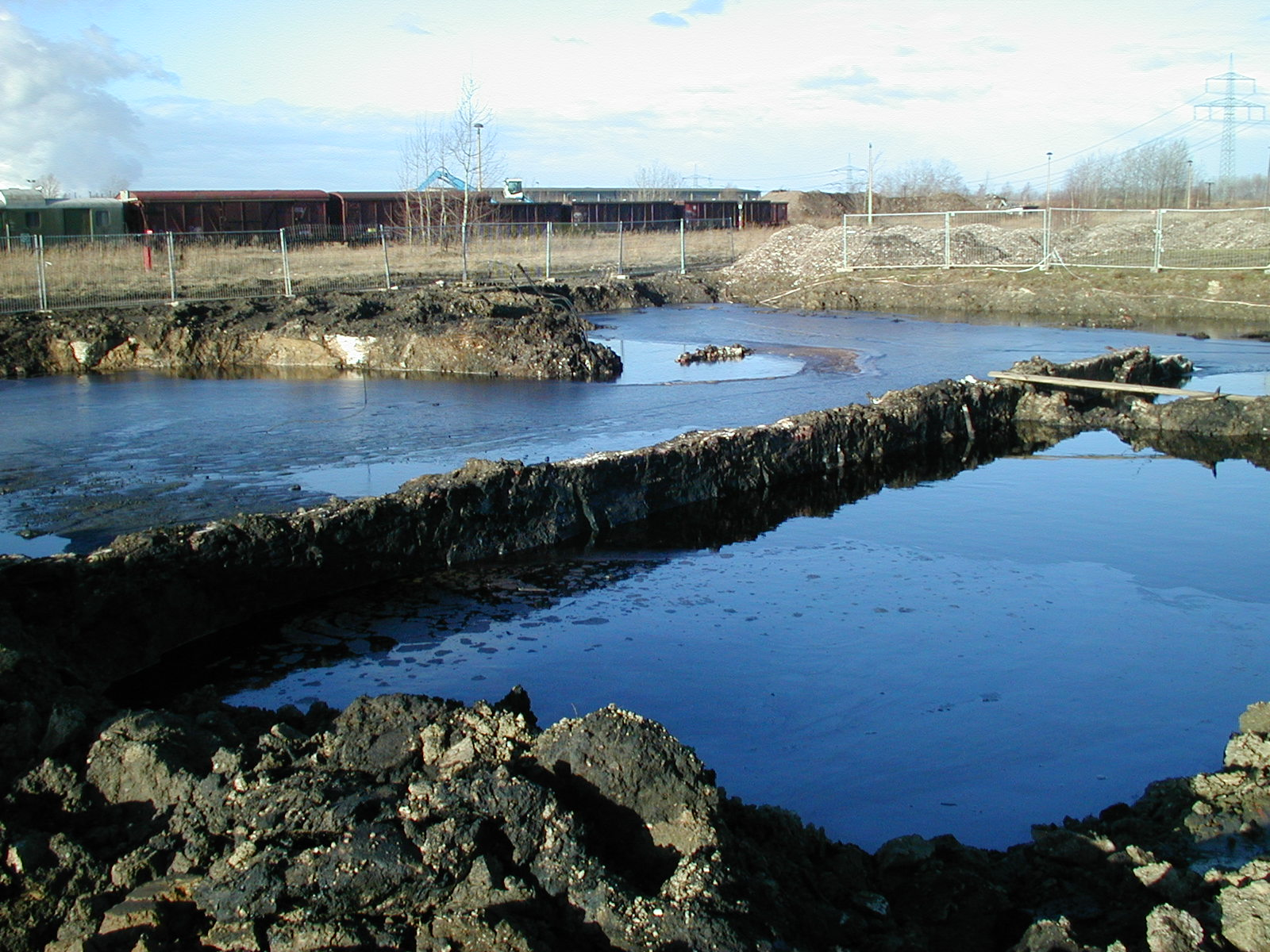 Teer- und Phenolanreicherung im Oberboden im Bereich des ehemaligen BV Espenhain. Aufnahme während der Sanierungsarbeiten 2002